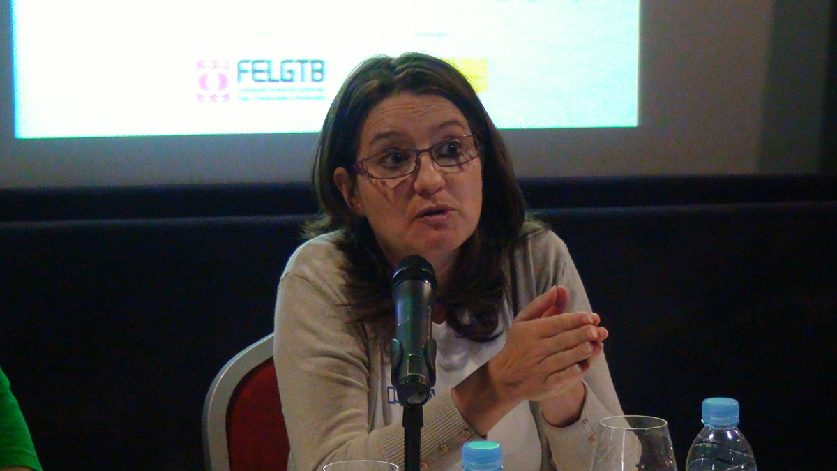 Mónica Oltra a la III Trobada de famílies homoparentals